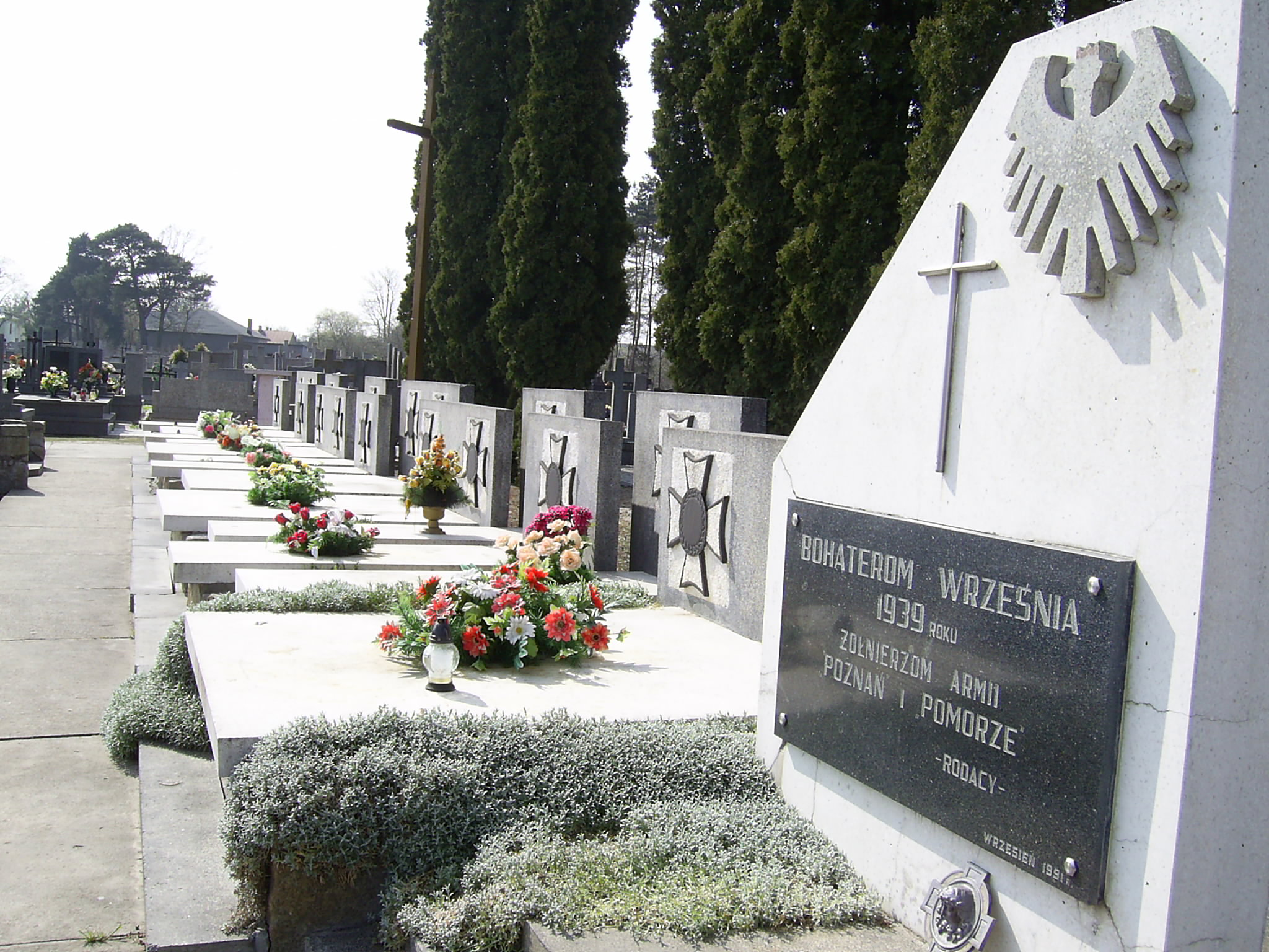 Pomnik żołnierzy armii "Poznań" i "Pomorze" w Brzozowie Starym